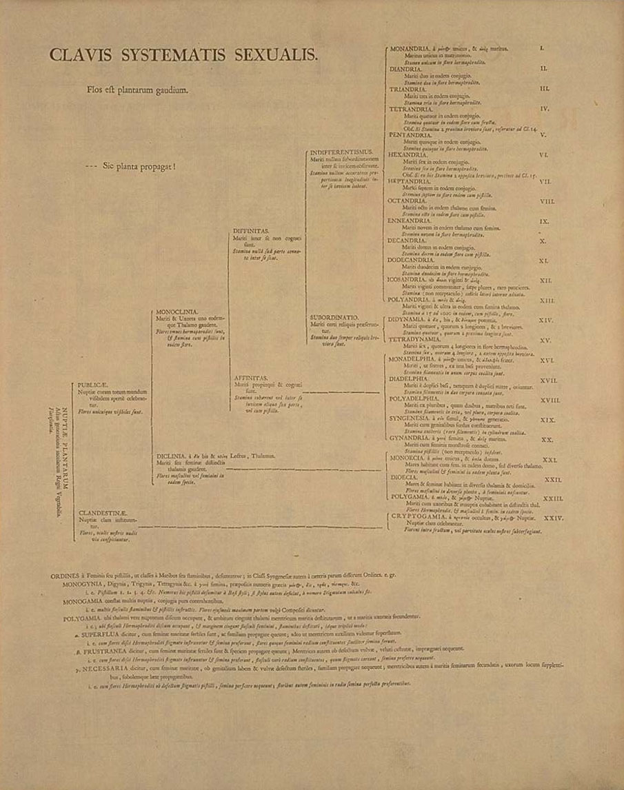 darstellung von Linné Sexualsystem der Pflanzen "Clavis Systematis Sexualis" in der 1. Auflage von Systema Naturae